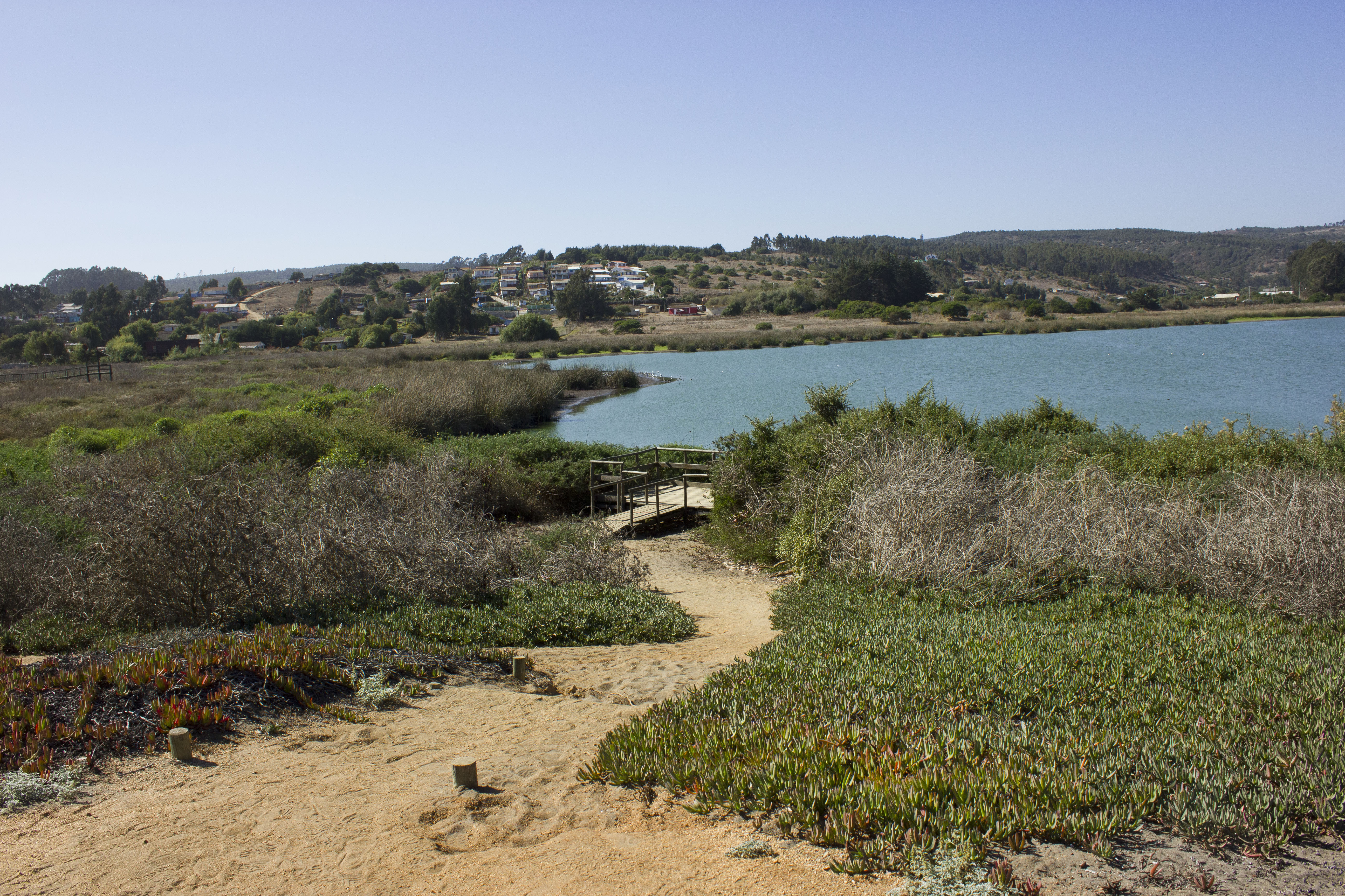 Laguna El Peral This is a photo of a national monument in Chile: 799